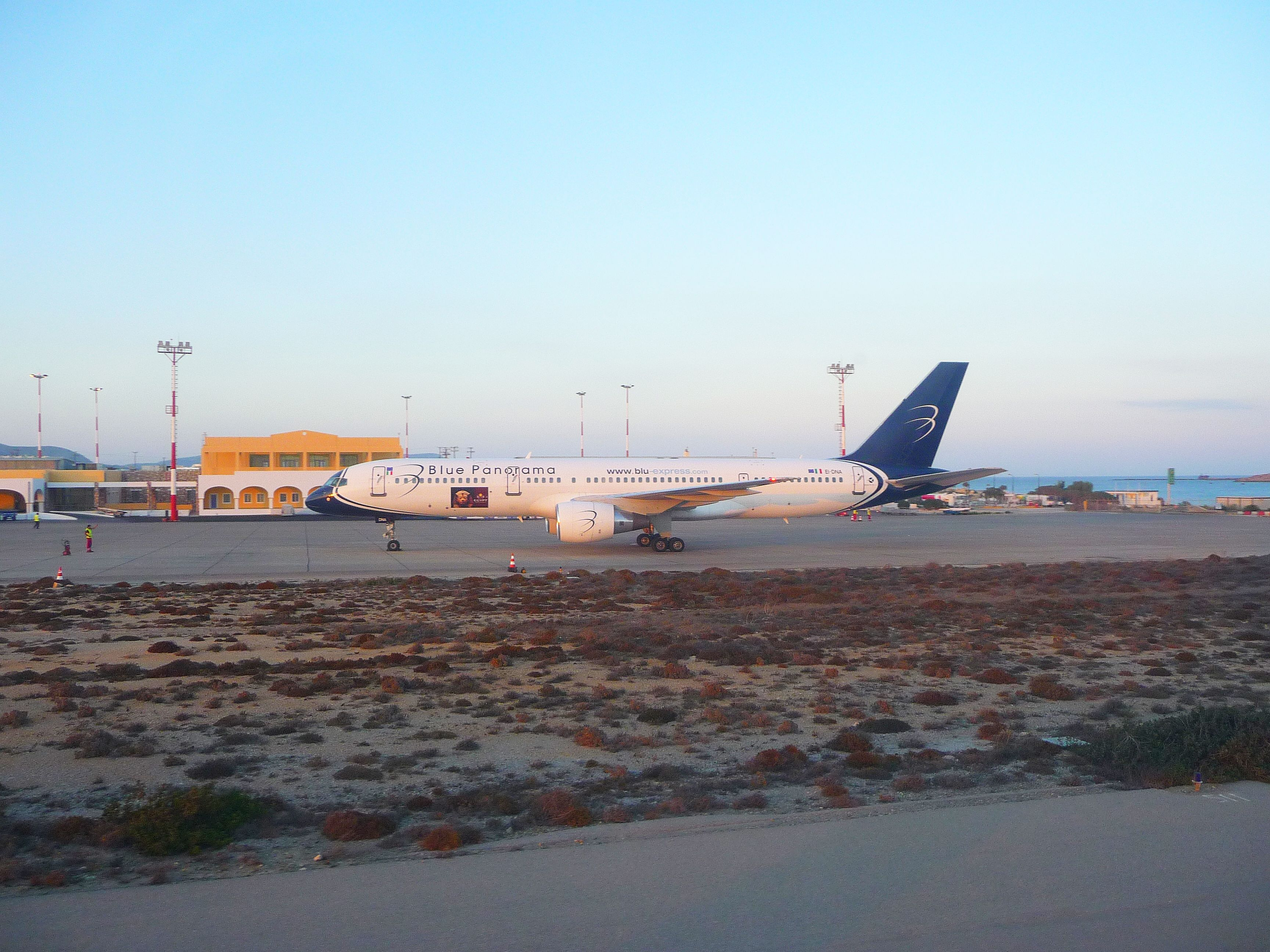 Boeing 757-200 der italienischen Fluggesellschaft Blue Panorama am Flughafen Karpathos